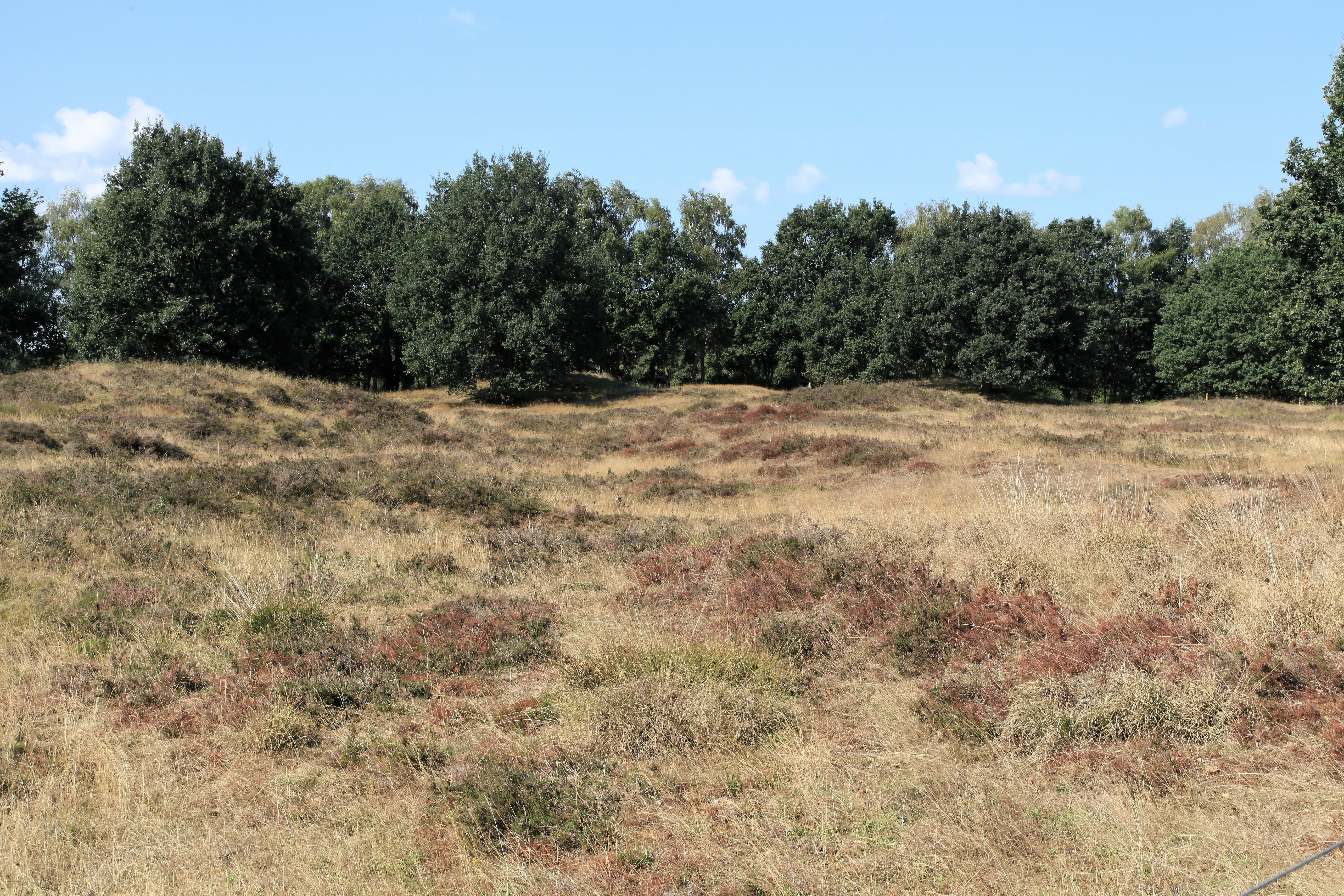 Grabhügelfeld Manseberge im NSG "Hügelgräberheide bei Gr. und Kl. Berßen", hier in Klein Berßen